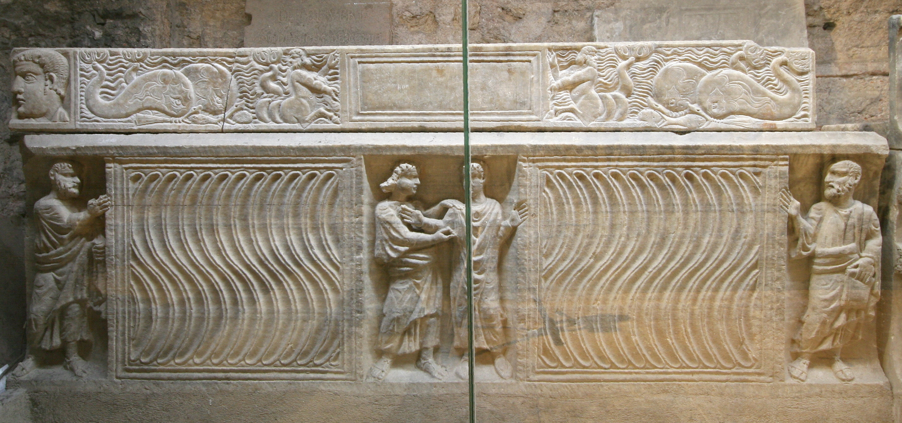 Basilique de Saint-Maximin (département du Var). Sarcophage paléochrétien dit pour certains de " sainte Marcelle", et pour d'autres de St Maximin (fin IV°-début V° siècle), se trouvant dans la crypte de l'église.